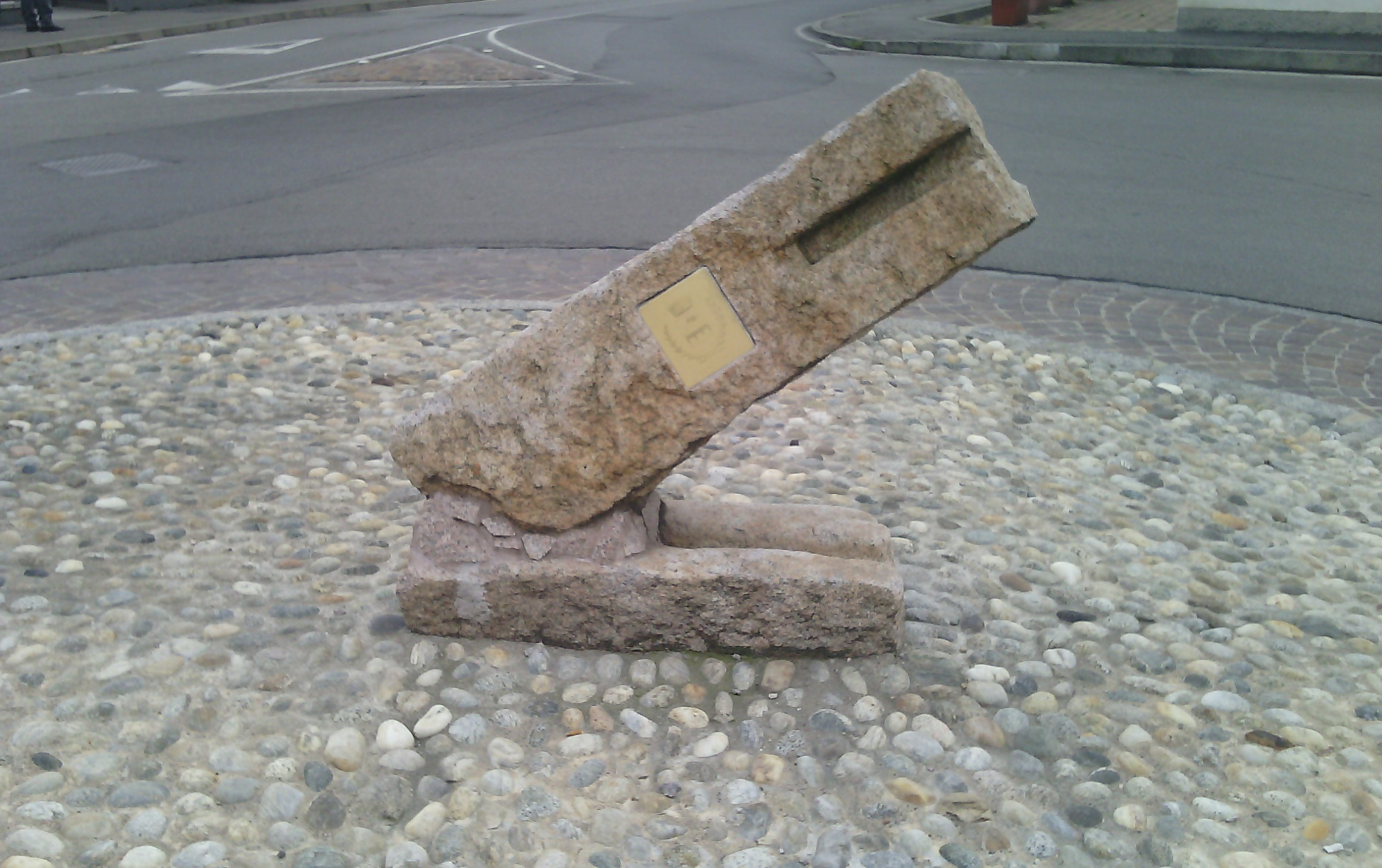 Parte del ponte di Boffalora sopra Ticino (MI) distrutto durante la battaglia del 1859 e oggi monumento commemorativo in paese